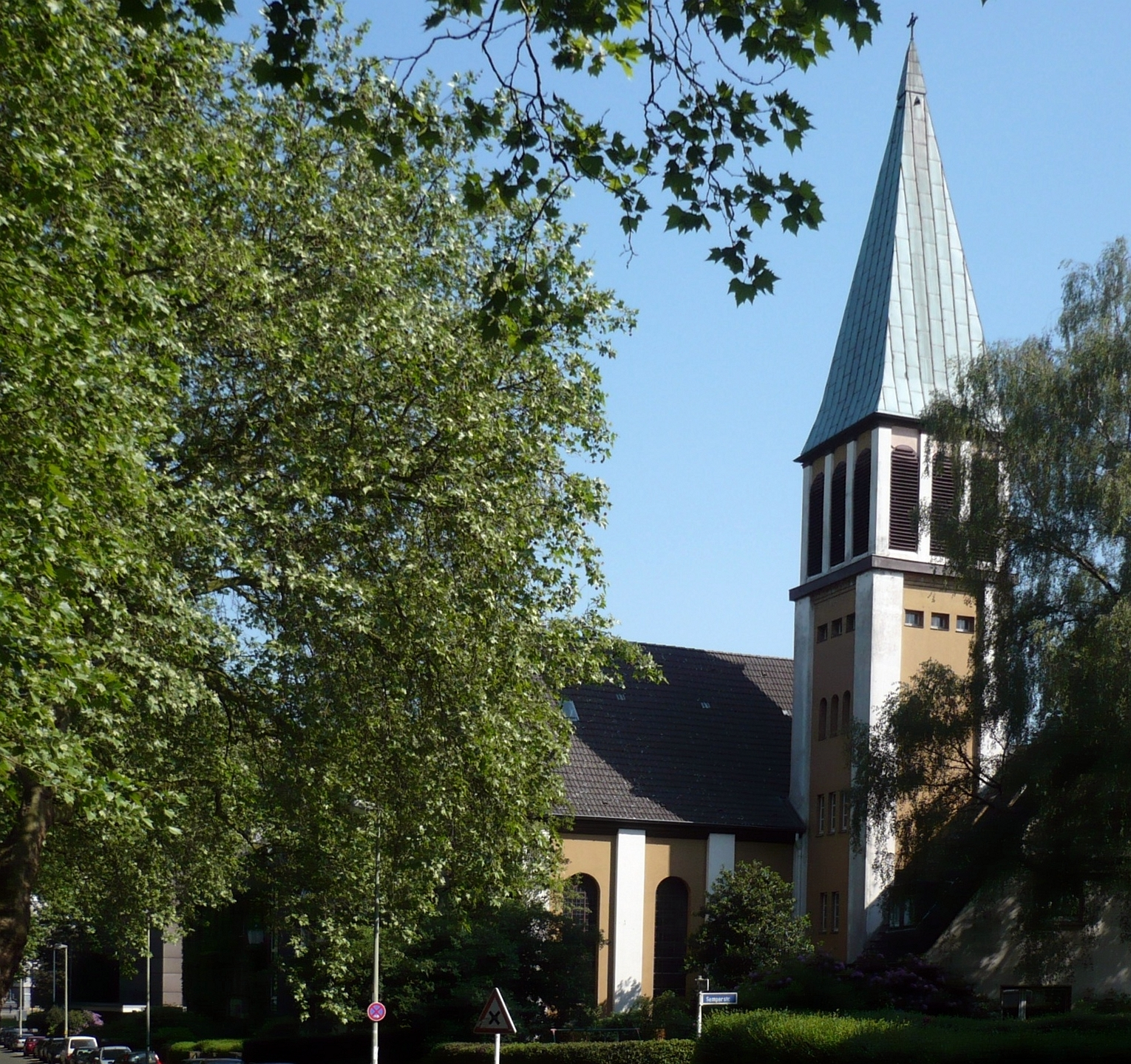 Altlutherische Kirche im Essener Südostviertel, heute Kirche der SELK (Selbständige Evangelisch-Lutherische Kirche)